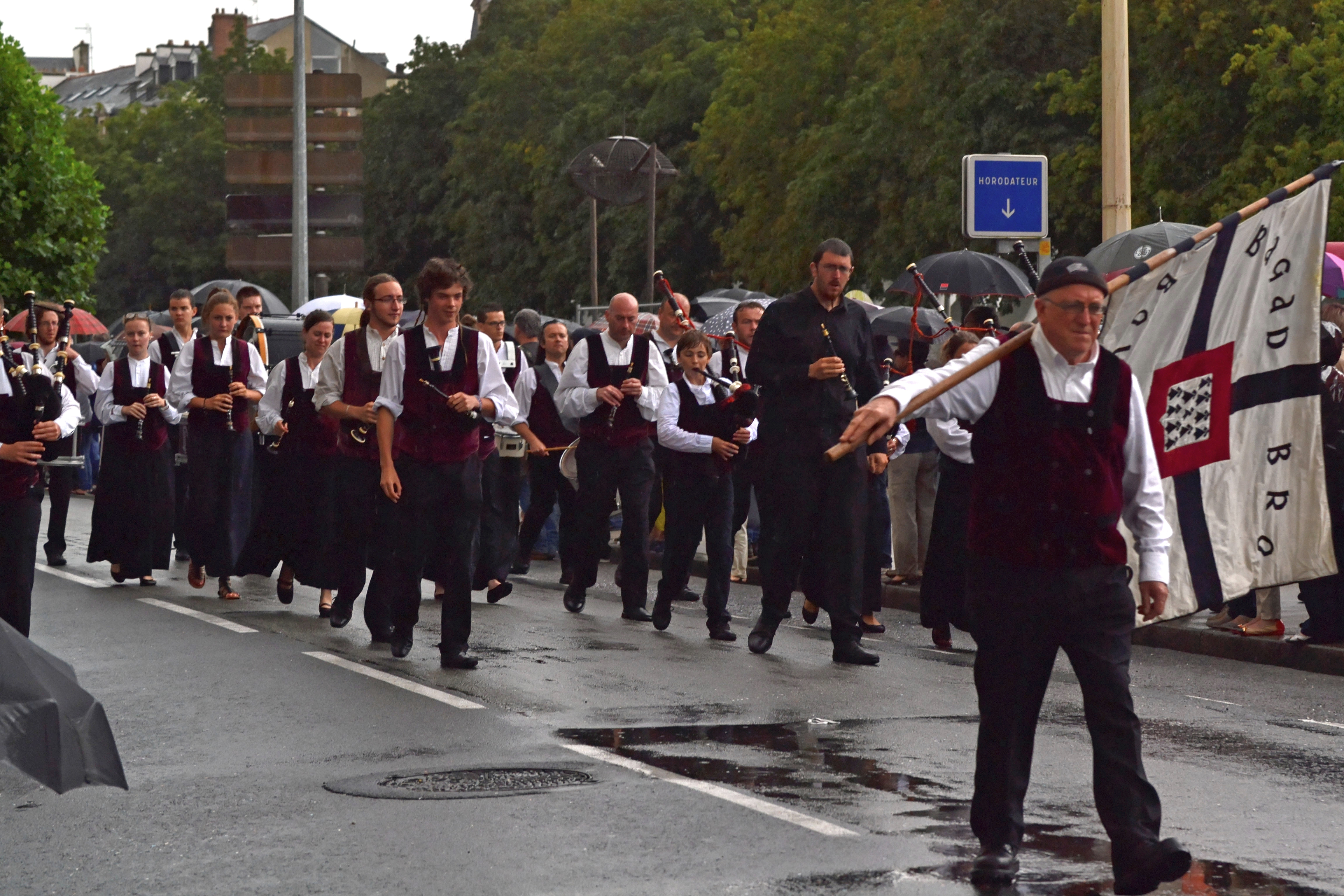 "Défilé en fête". Le Bagad Boulvriag (Bourbriac) lors du festival de Cornouaille 2013 le dimanche 28 juillet pour Kemper en Fête dans les rues de Quimper.